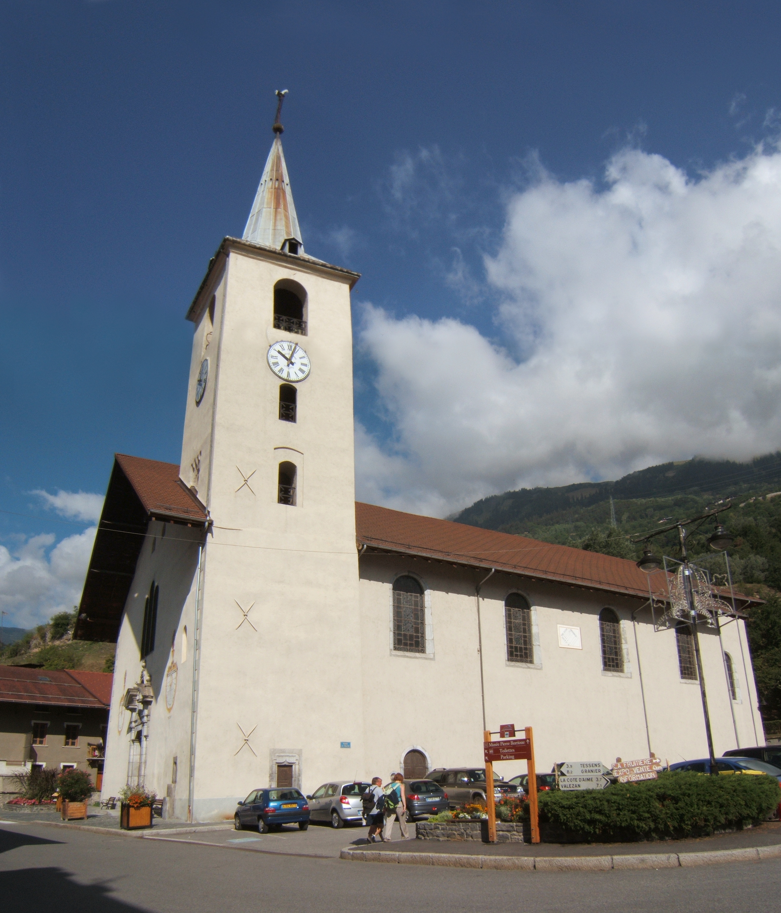 Primitivement, l’église paroissiale d’Aime était construite sur la colline Saint-Sigismond. Au 13e/14e siècle, elle fut transportée à l’emplacement actuel. Elle était alors "orientée", c’est-à-dire que sa porte d’entrée se situait à l’ouest et que son chevet était à l’est. Elle était alors dédiée à Saint Sigismond, le dernier roi burgonde qui au 5e siècle apporte un appui décisif aux catholiques du royaume.